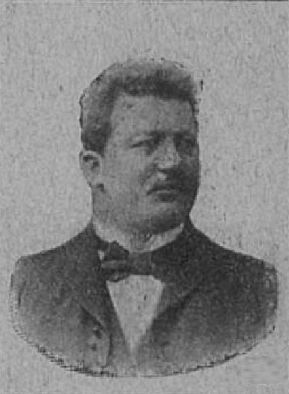 Václav Jílek (1867-?), rakouský a český statkář a politik